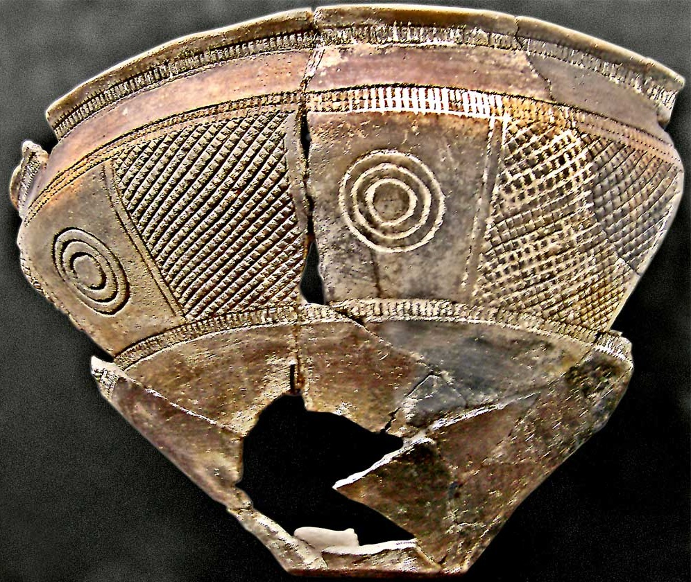 Cerámica de 'boquique', alfarería prehistórica así conocida o como cerámica de punto y raya, haciendo alusión al dibujo superficial que caracteriza a esta técnica decorativa alfarera doble o mixta. Vasija procedente de San Román de Hornija, provincia de Valladolid (Bronce final, Cultura de Cogotas-I, 1100-800 adC). Se conserva en el Museo Arqueológico de Valladolid.